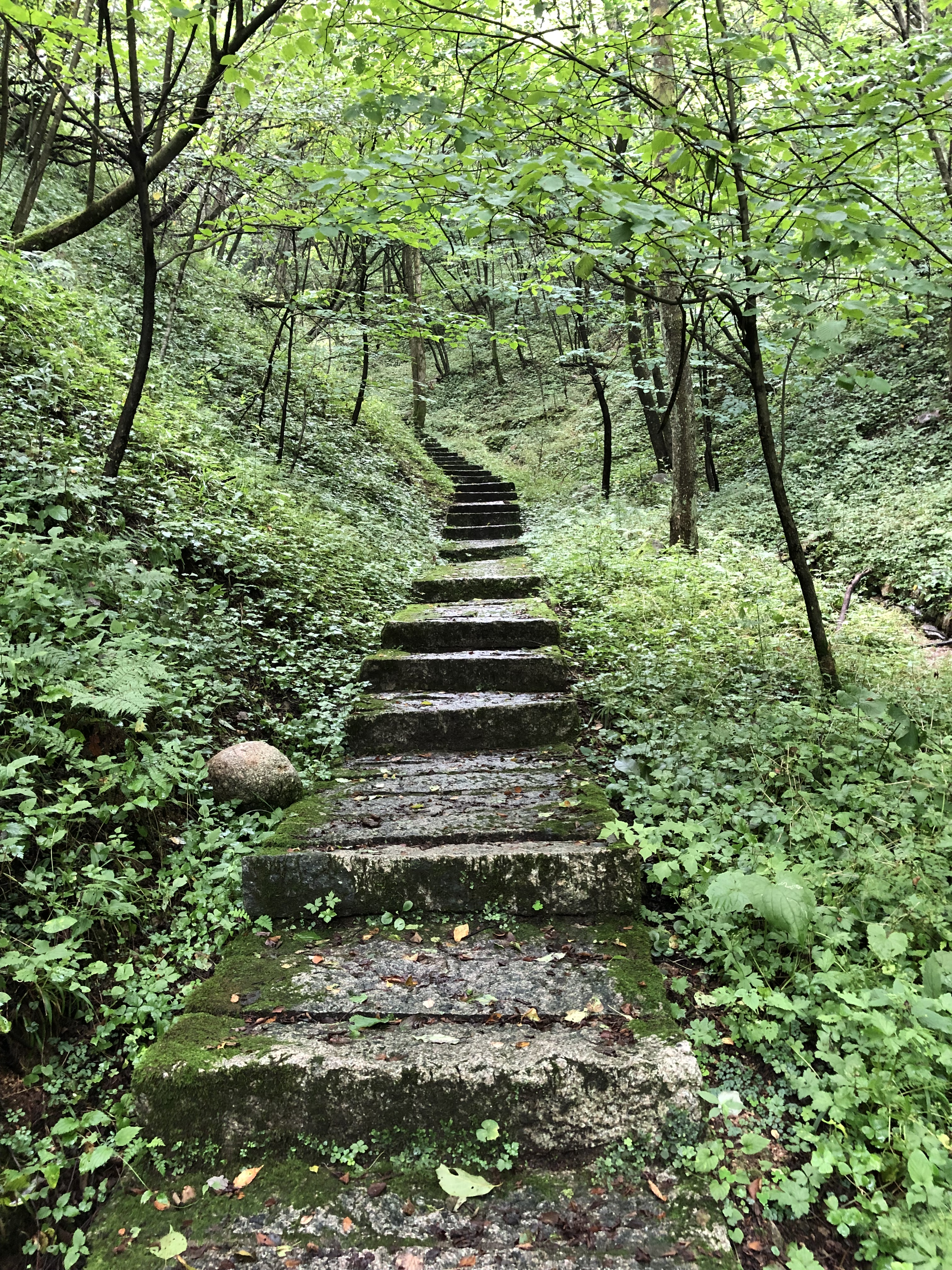 中文（中国大陆）: 大老岭植物园，位于湖北省宜昌市夷陵区与兴山县、秭归县交界处的大老岭国家级森林公园。